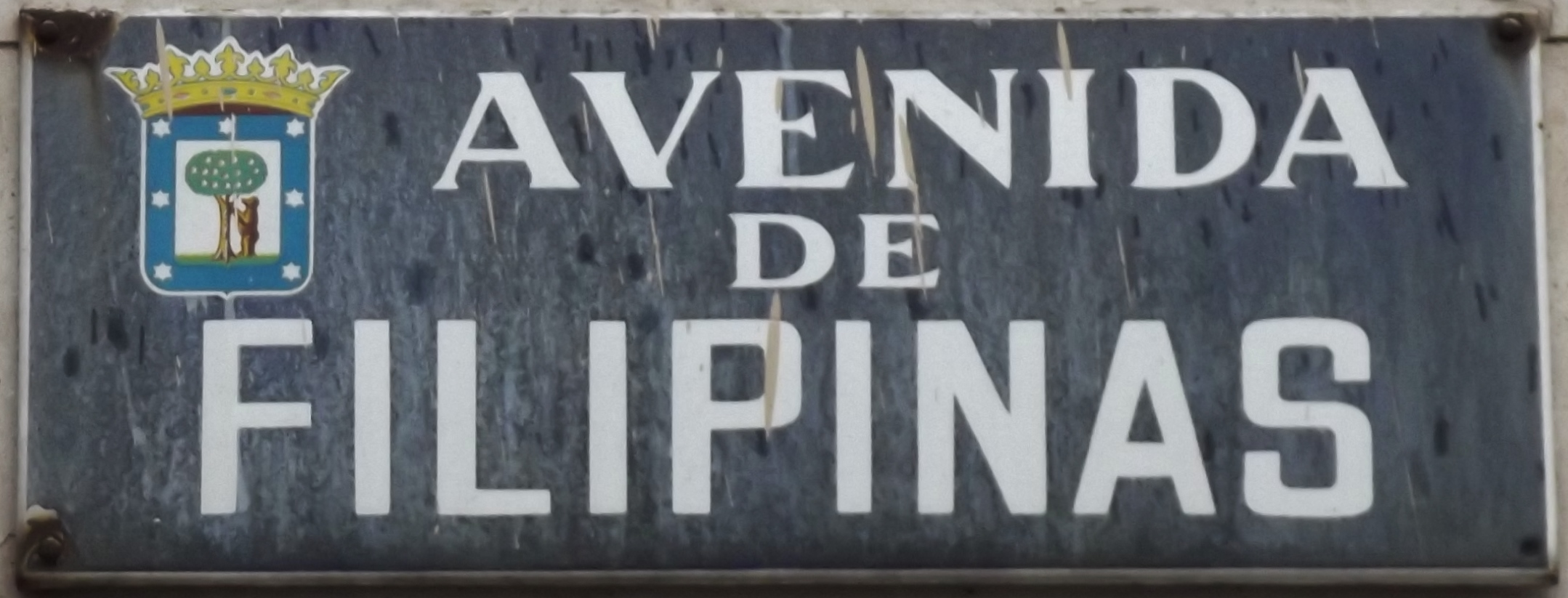 Placa de la Avenida de Filipinas, Madrid